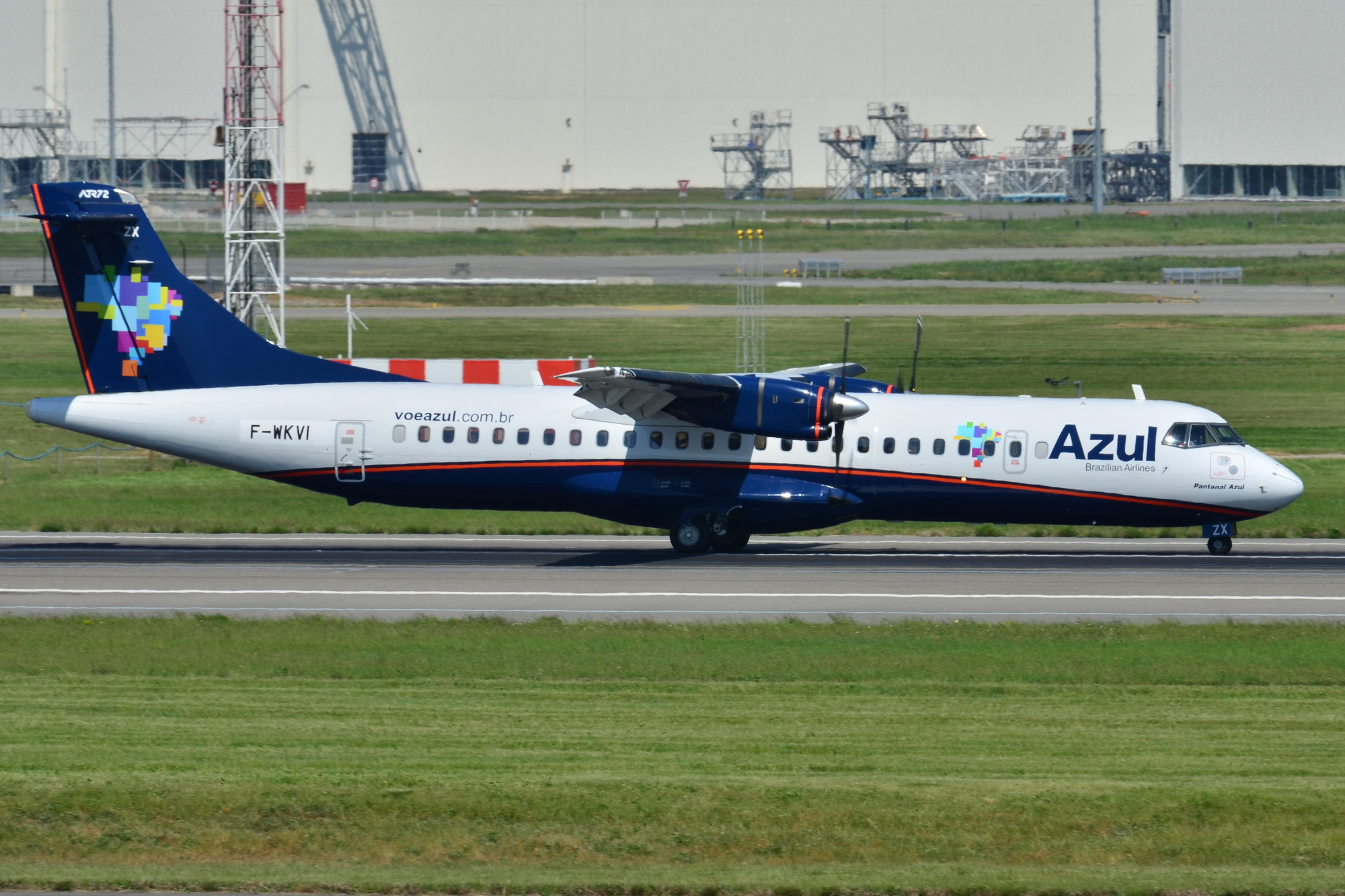 Photo prise à l'aéroport de Toulouse-Blagnac (LFBO) en France. Picture take at Toulouse-Blagnac Airport (LFBO) in France.